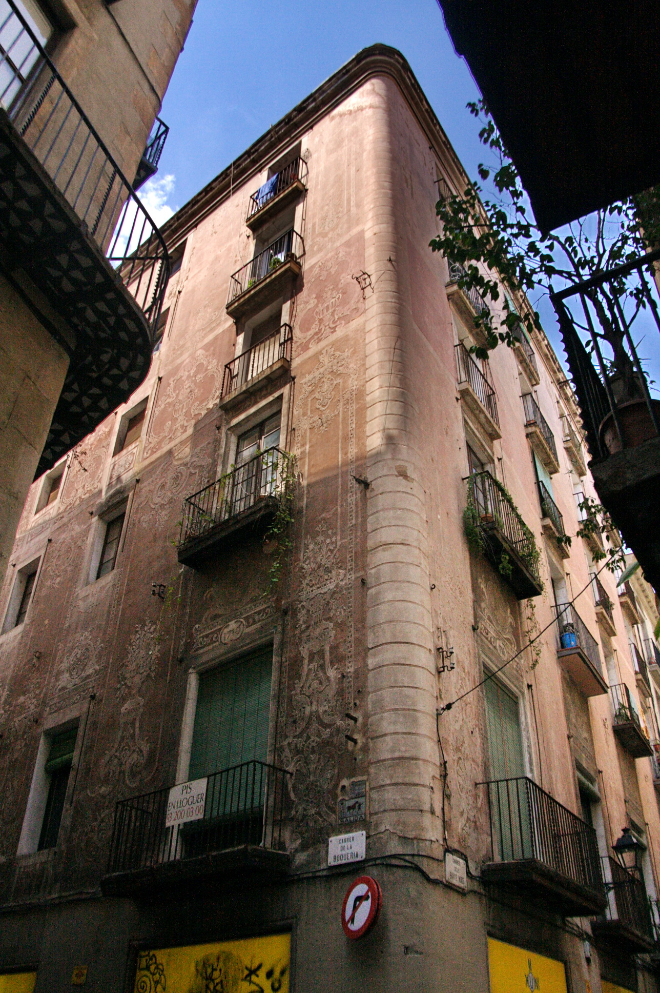 Casa al carrer Banys Nous, 1 (Barcelona)